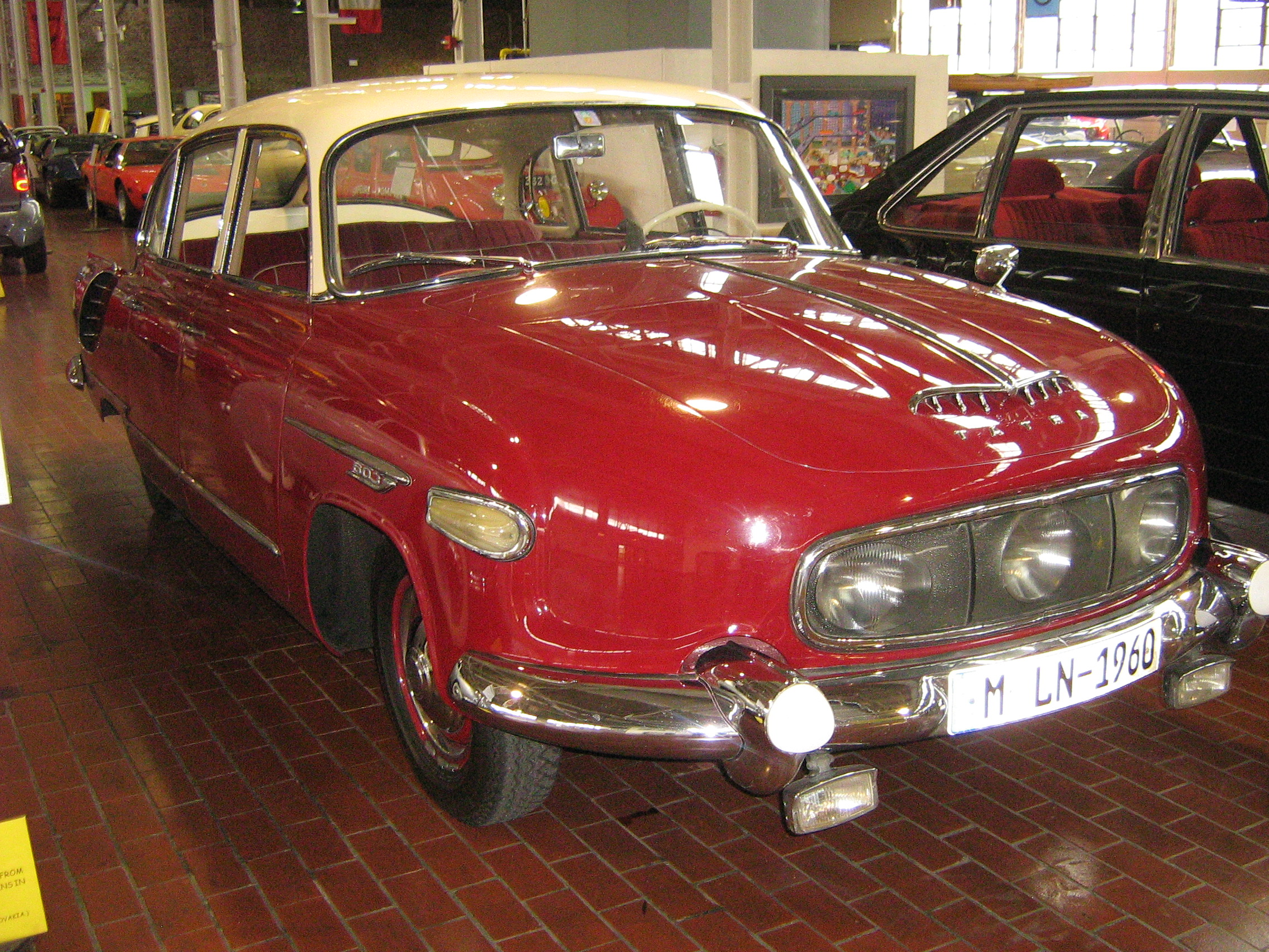 1958 Tatra T-603